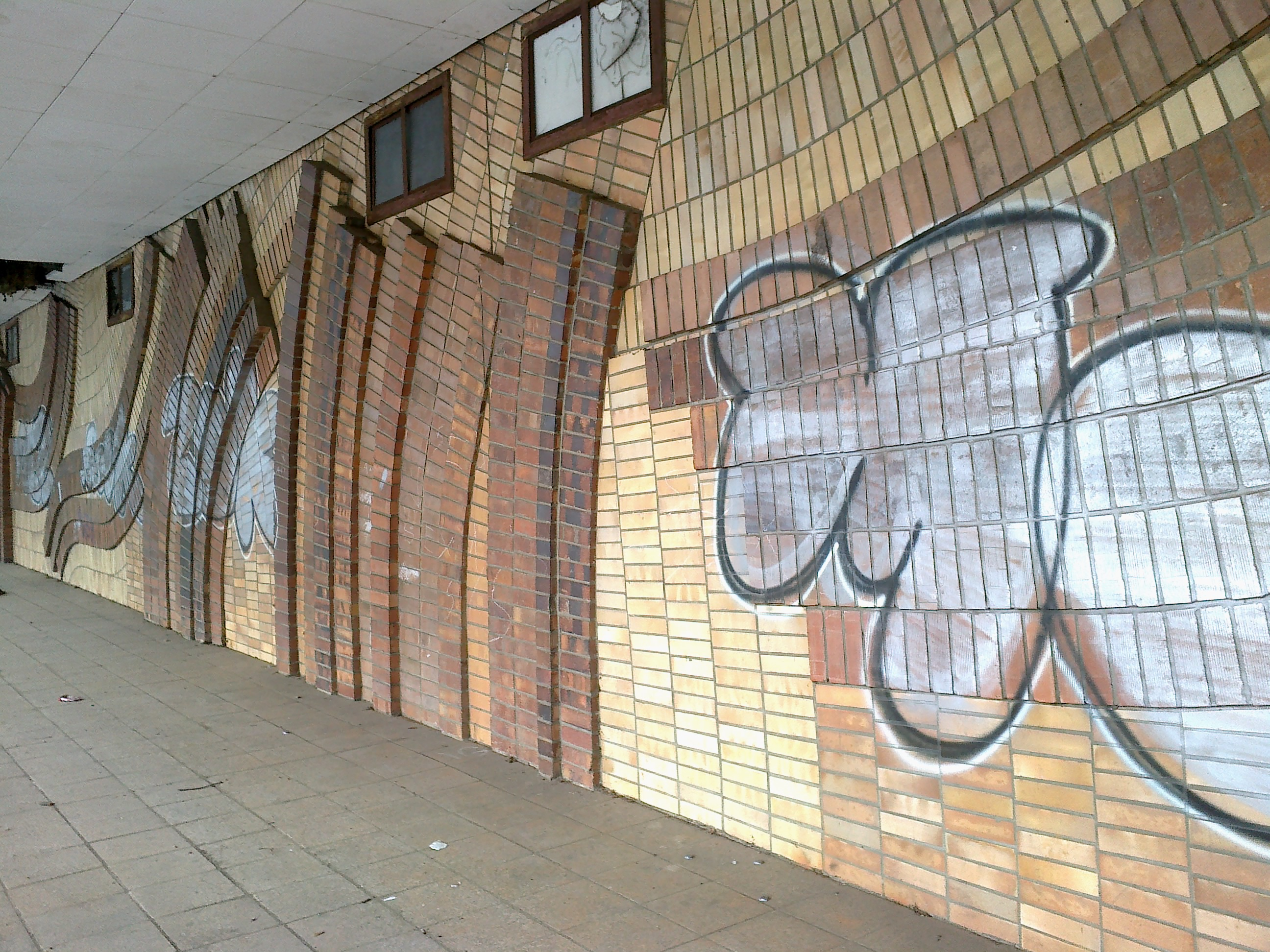 Bruno Groth, Wandgestaltung um 1988, Magdeburg, Deutschland